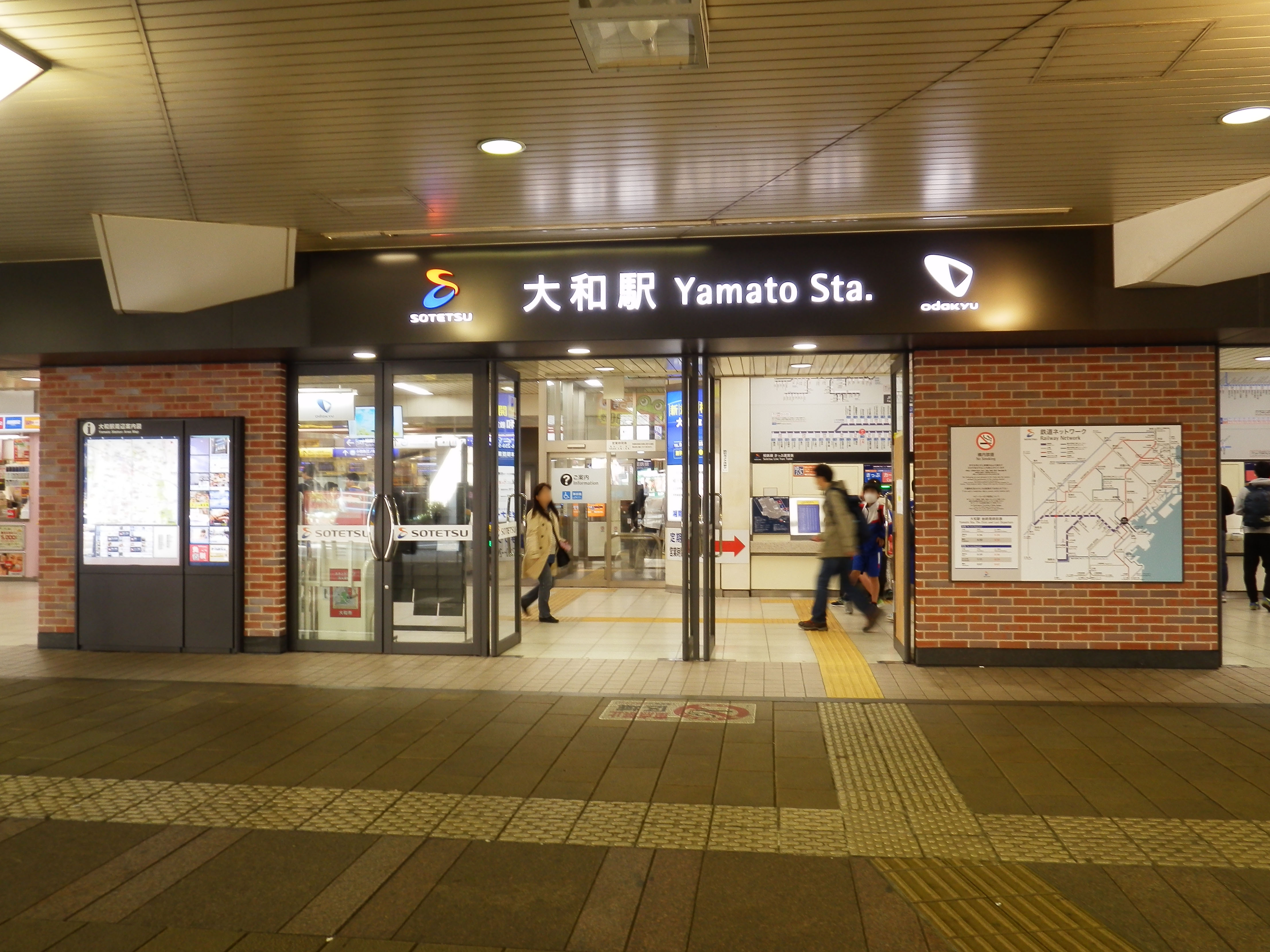 大和駅相鉄口